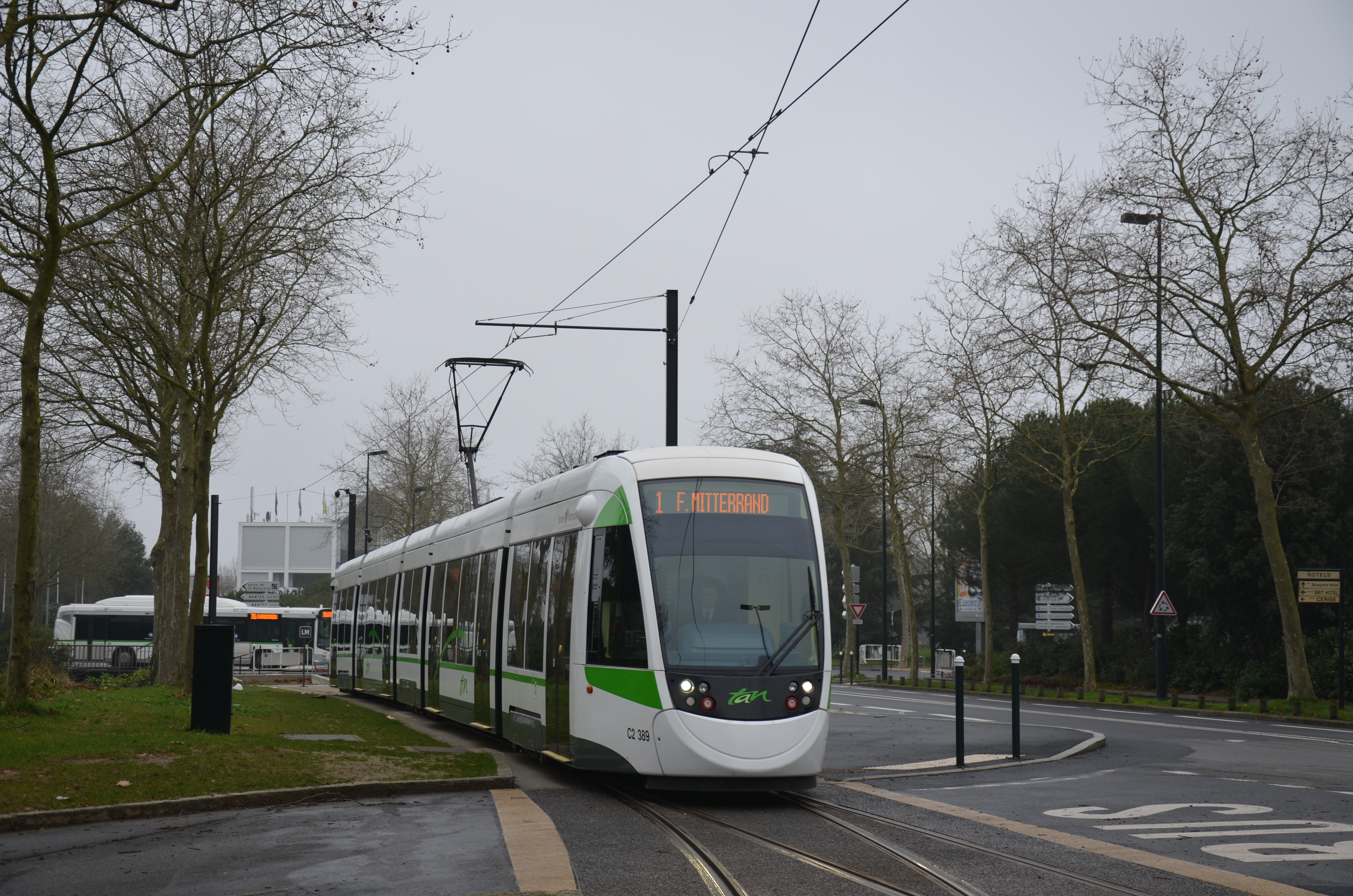 CAF Urbos 3 n°389 dans son retournement à la Beaujoire, sur la ligne 1 du tramway Nantais.